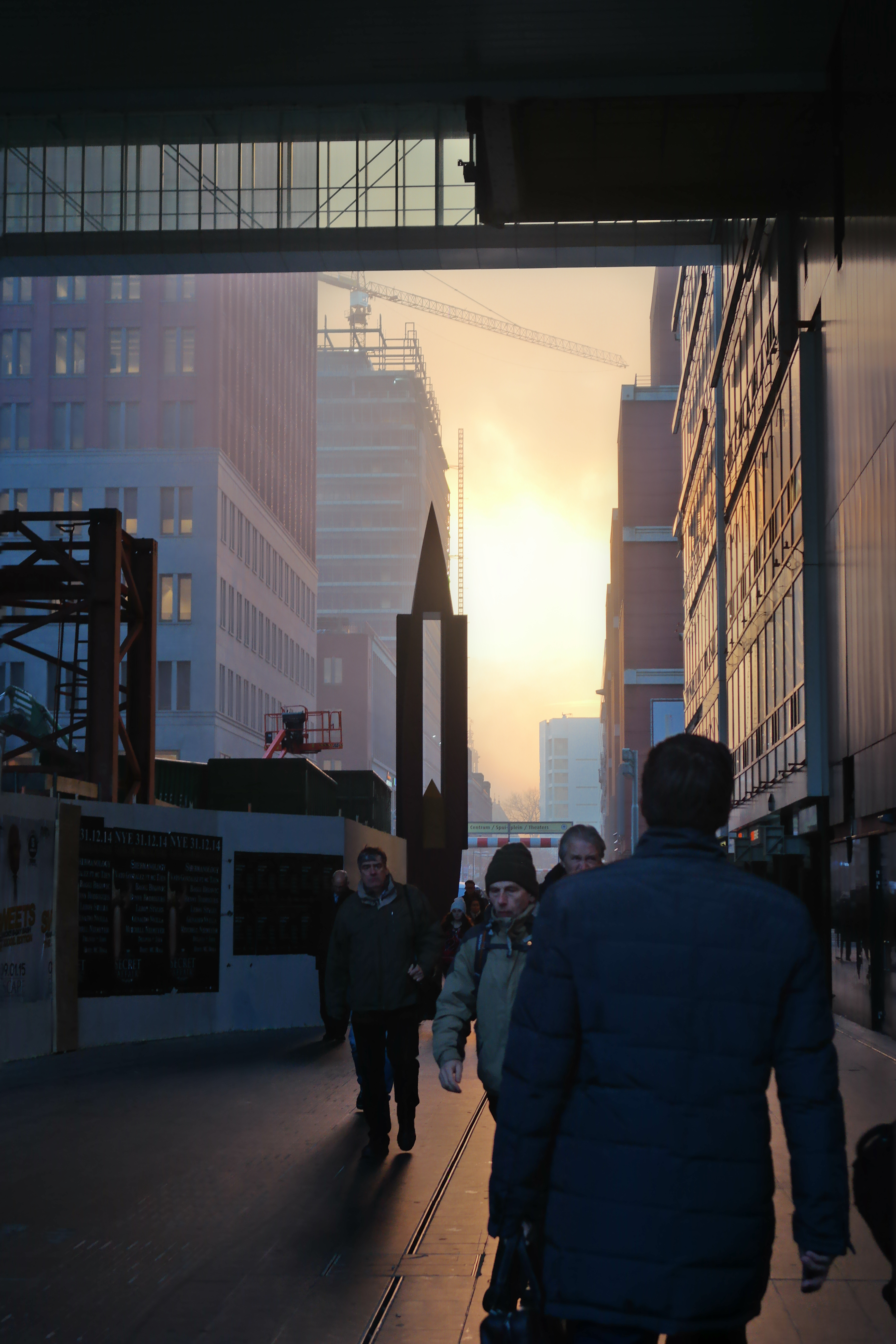 De Haagse Turfmarkt bij zonsondergang.